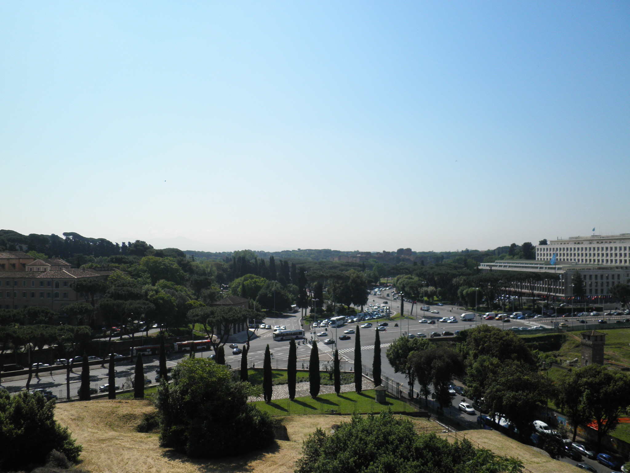 Roma, piazzale di Porta Capena dalla terrazza del Palatino. A sinistra via di S. Gregorio, a destra viale Aventino, sotto via dei Cerchi.